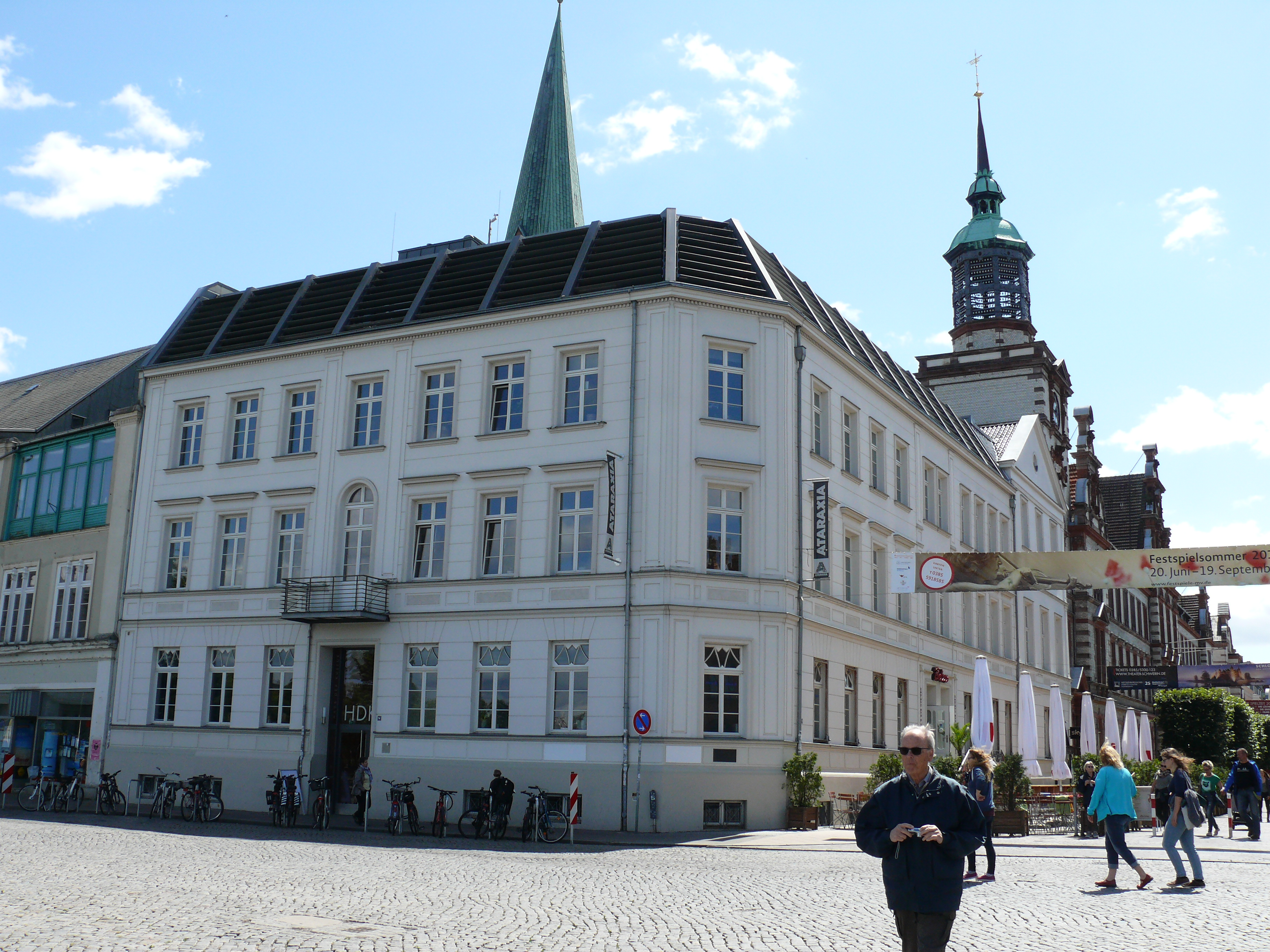 Das Gebäude "Mecklenburgstraße 2" in Schwerin.